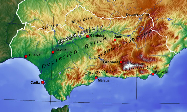 Mapa físico de Andalusia